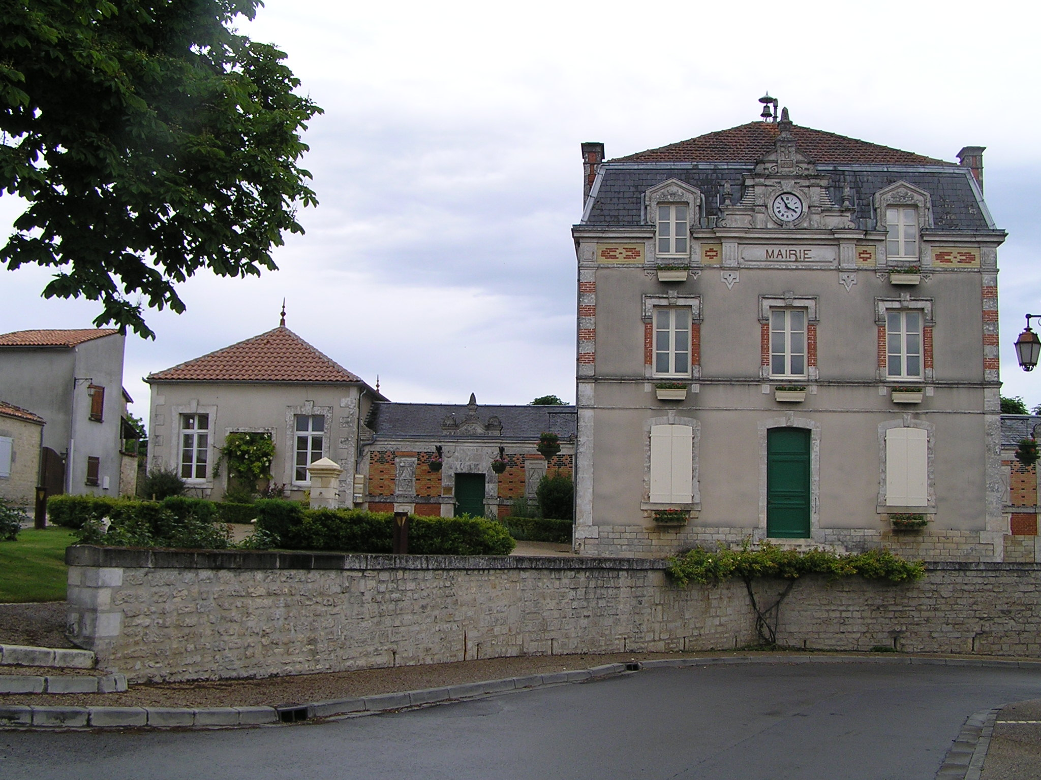 monument aux morts de Villejésus